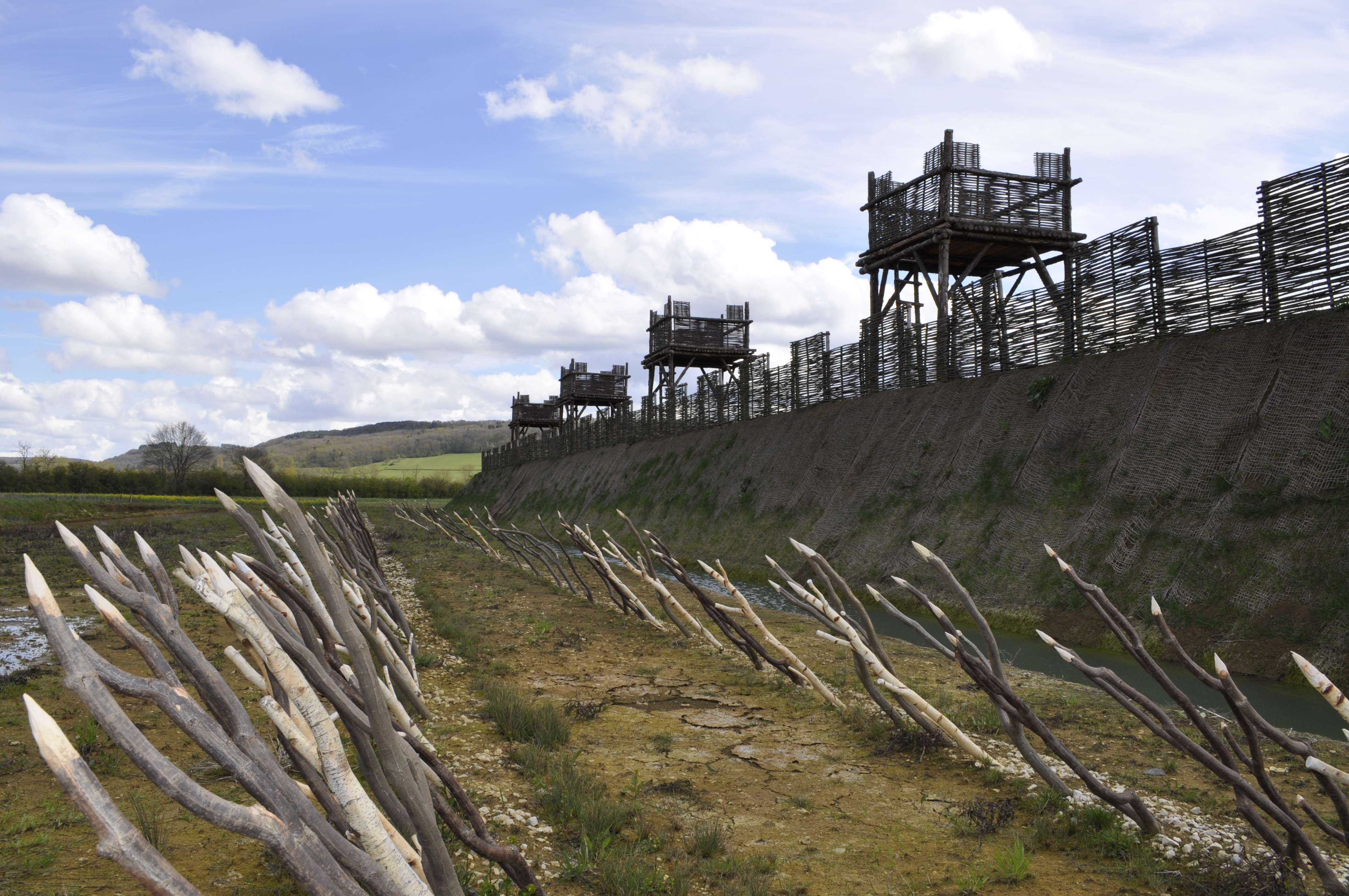 Muséoparc d'Alésia : vue de la fortification et de la ligne de défense.